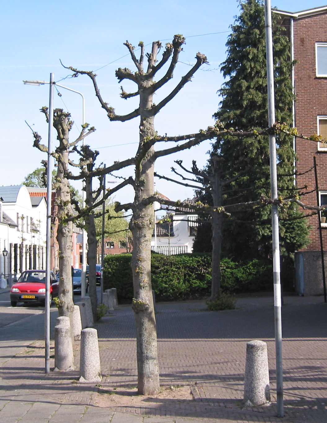 (nl: Leilinde) Tilia